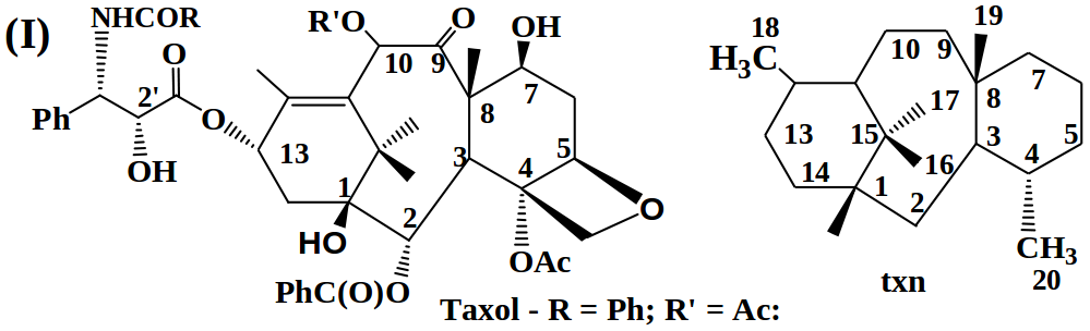 Տաքսանային կմախք